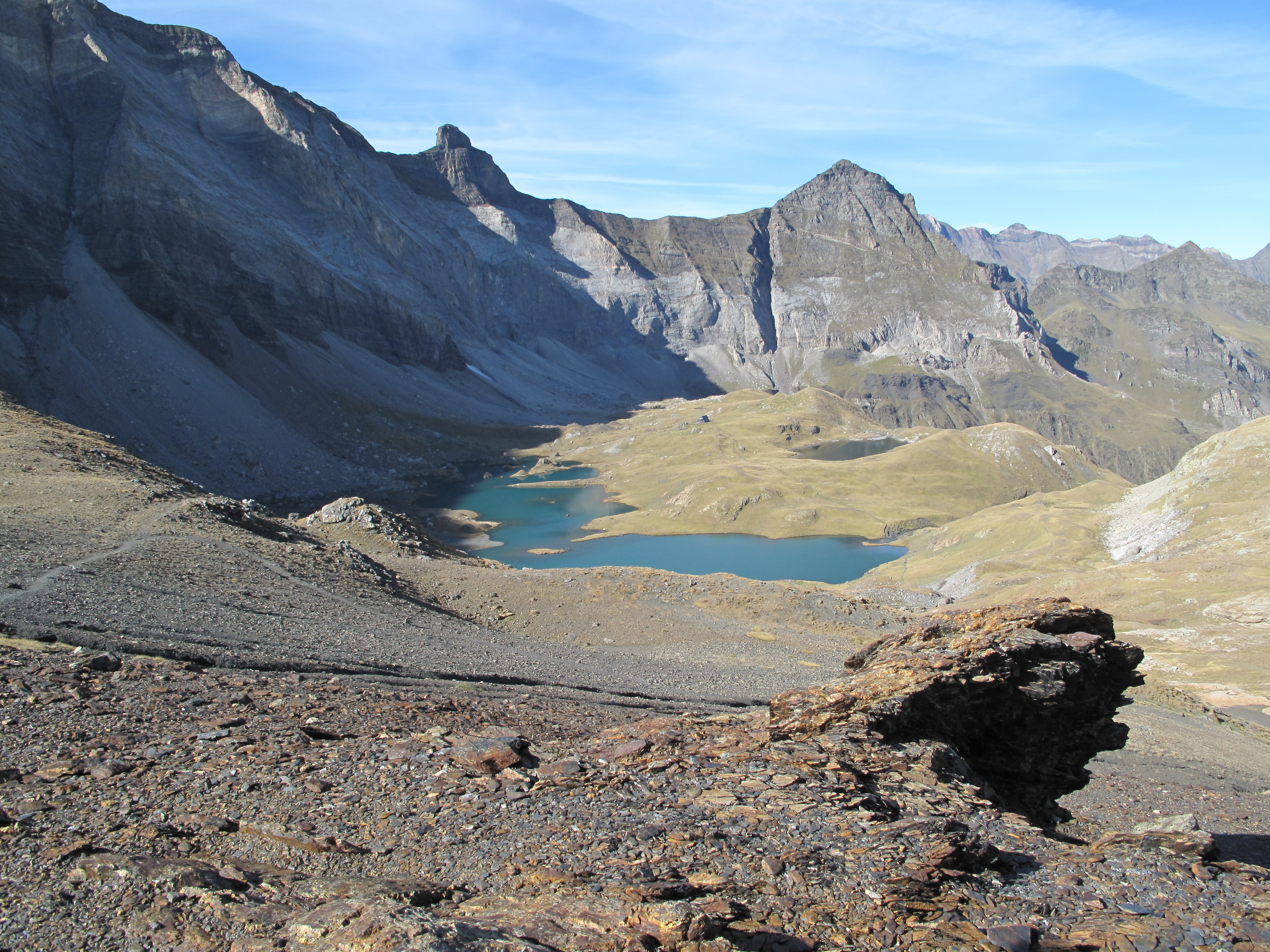 Depuis la surface caillouteuse (débris d'ampélite) du port de Barroude, vue sur le "balcon" de Barroude, avec ses deux lacs et son refuge, au pied de la muraille de Barroude, à gauche, dans l'ombre, surmontée de la dent du Pic Gerbats, et du Pic de La Gela.